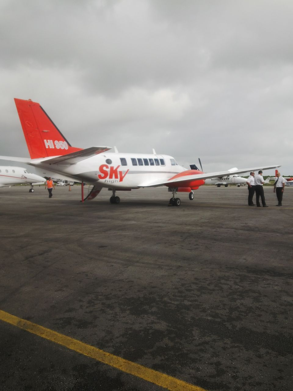 sky high